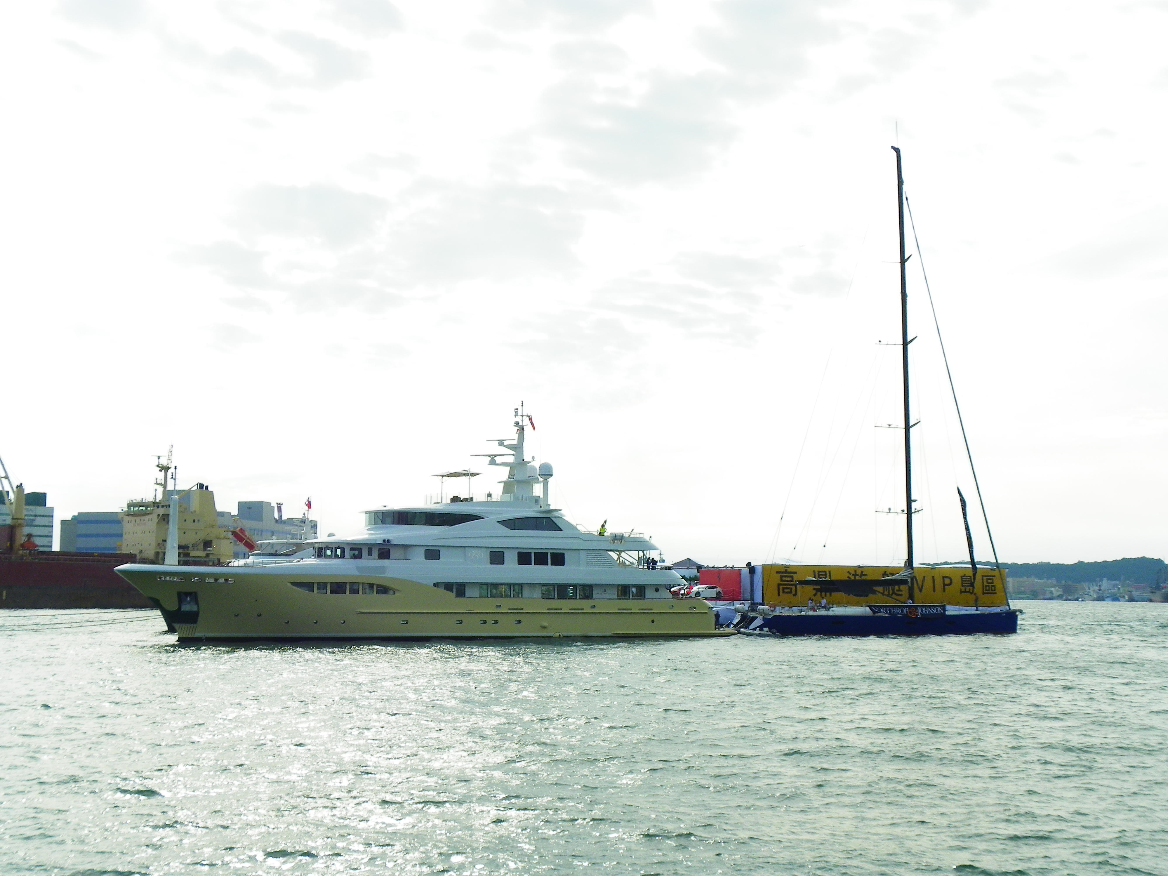 台灣國際遊艇展首日下午，高鼎遊艇在高雄港中，以數艘遊艇連結而成的VIP島區，受招待的貴賓從會場碼頭搭乘遊艇登島。